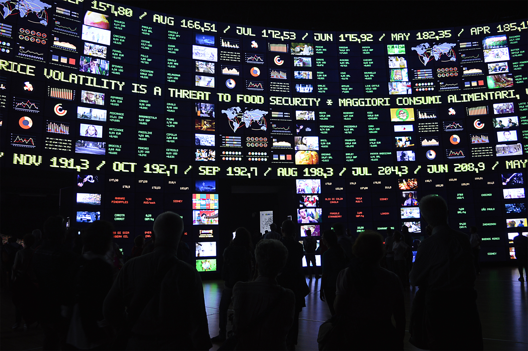 La sala della borsa del cibo al Padiglione Zero di EXPO Milano 2015